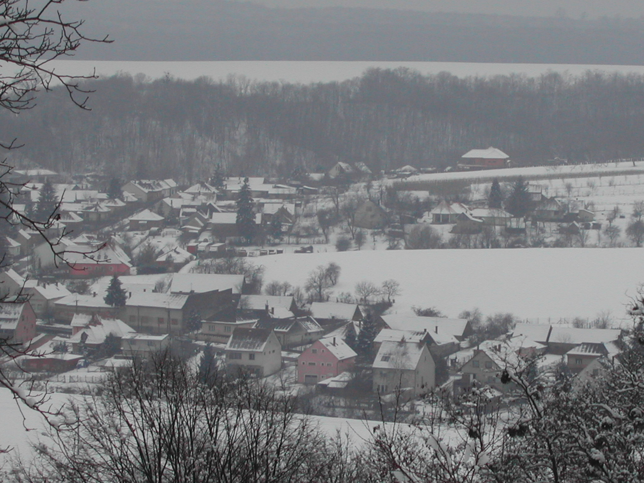 Sántos déli részének téli látképe az Öreg-hegyről